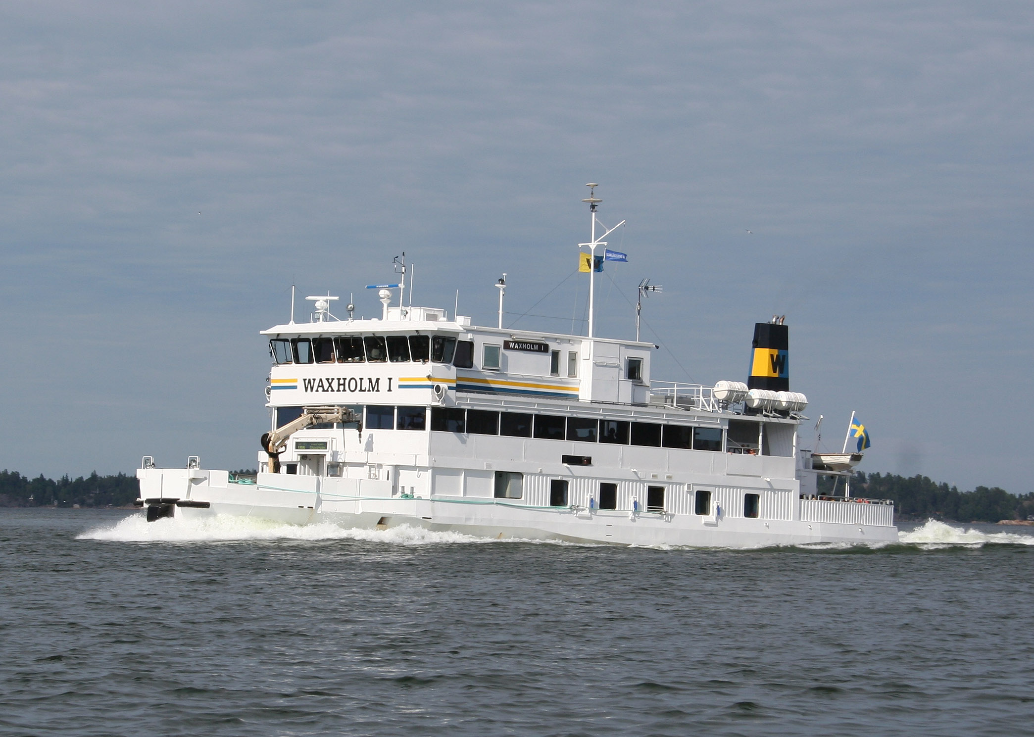 Waxholm I på väg västerut genom Lindalsundet norr om Värmdö. IMO number: 8218330 Information about Waxholm I may be found at IMO 8218330.A ship can change name and flag state through time, but the IMO number remains the same through the hull's entire lifetime. As a result, it can be useful to identify a ship by using the IMO number.